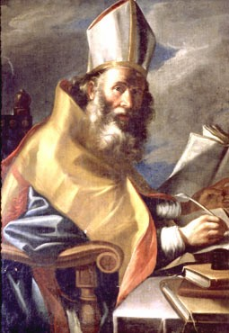 San Ambrosio.